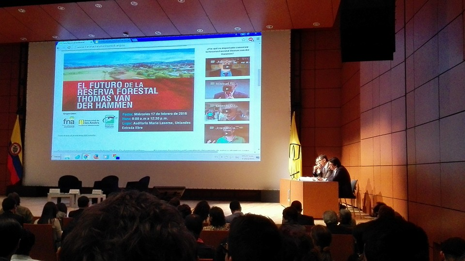 Instalación del Foro Nacional Ambiental sobre la Reserva Forestal Thomas van der Hammen